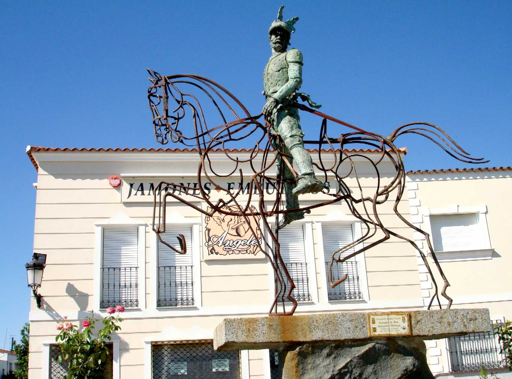 Estatua de Hernando de Soto en Barcarrota - Badajoz Autor:Fernando Soler del Campo